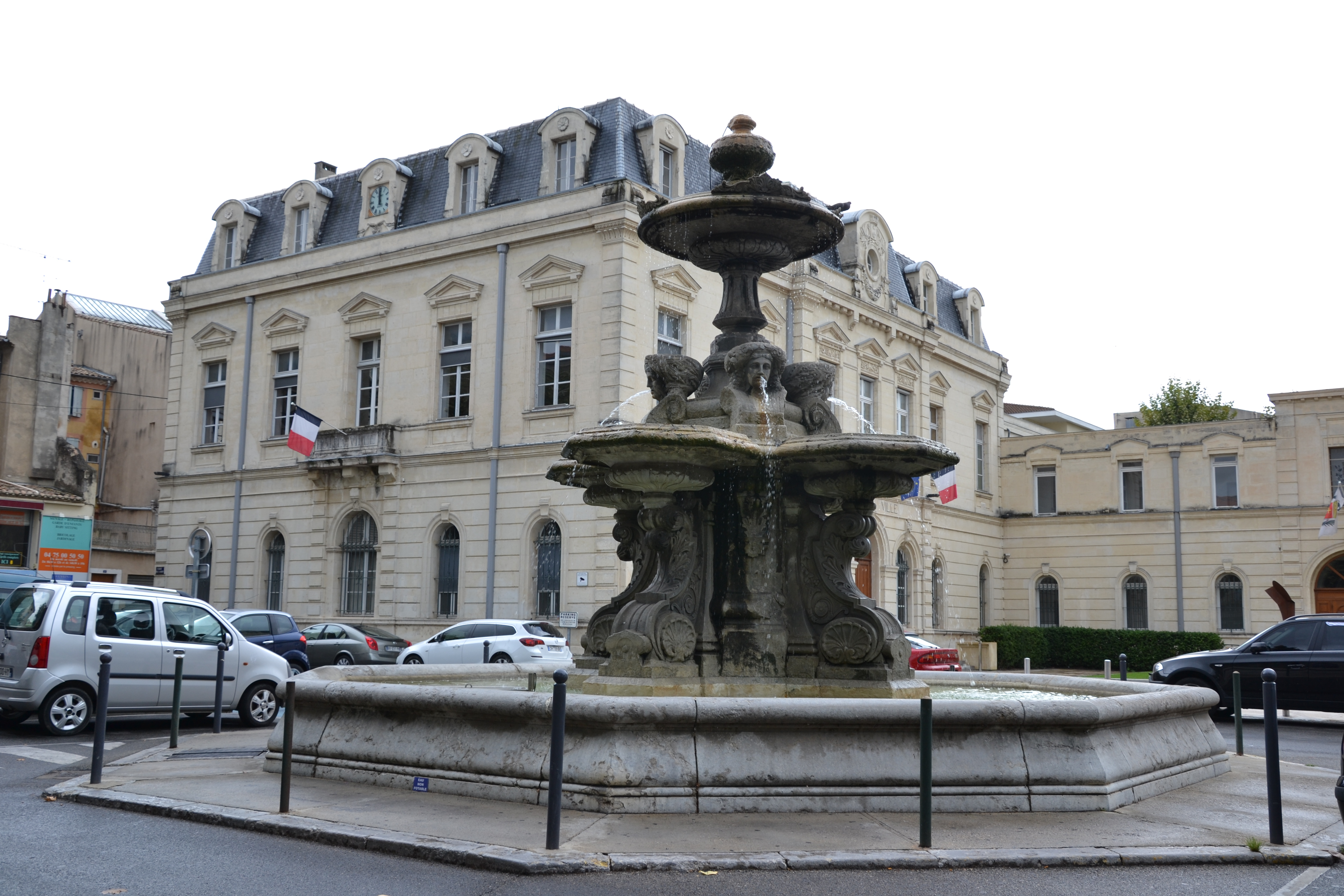 Fontaine à Montélimar